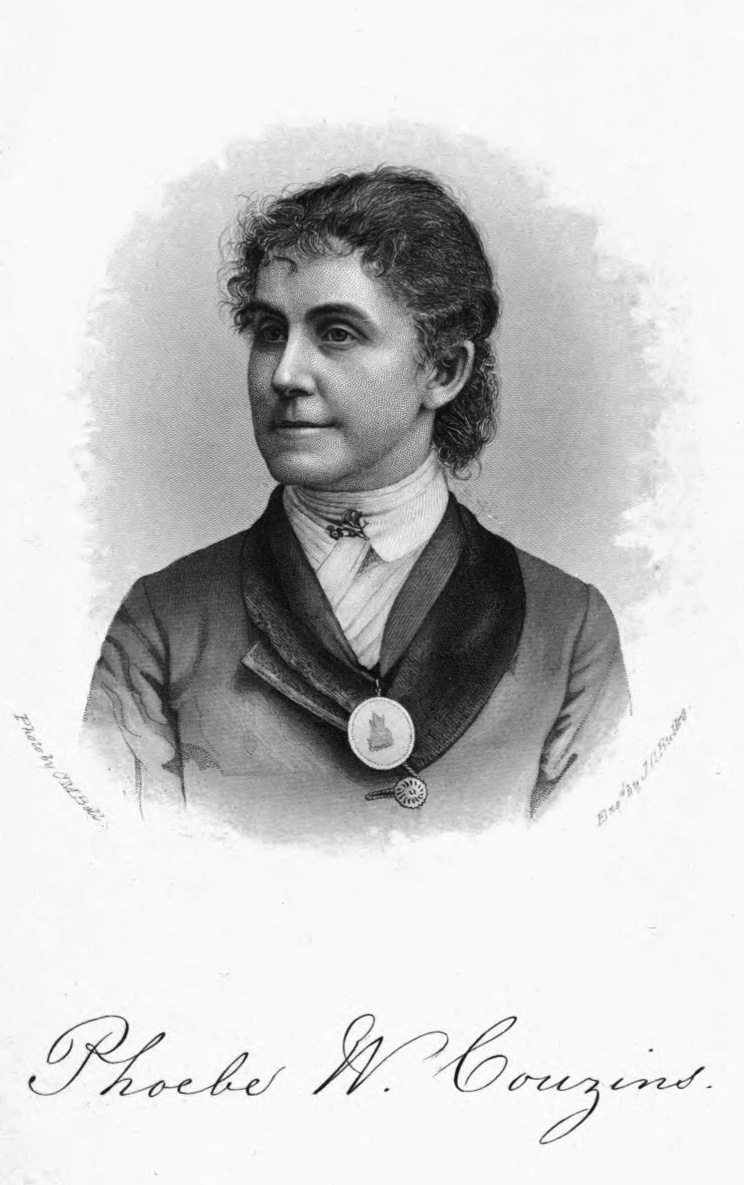 Phoebe Couzins